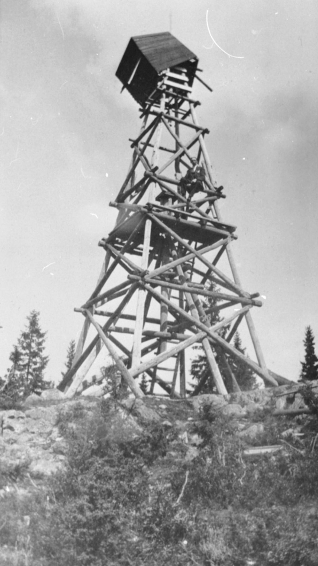 Brannvaktstårn på Høsbjørkampen i Ringsaker